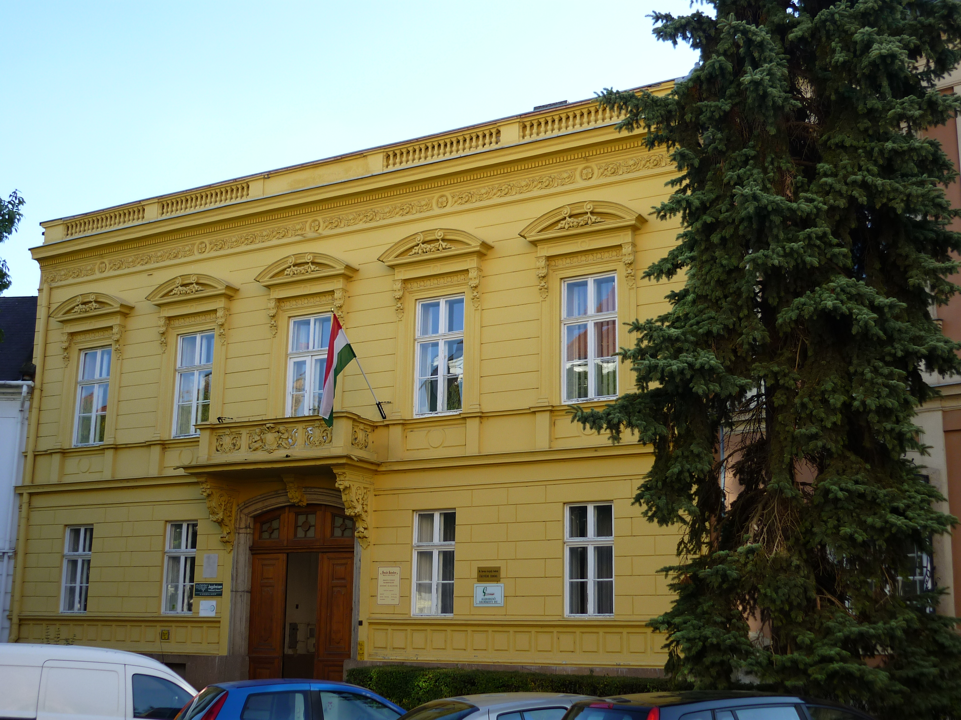 Kora eklektikus lakóház Egerben 1868-ból (jelenleg az EGERERDŐ Erdészeti ZRt. székháza, helyőrségi klub és a könyvtár idegennyelvű részlege)